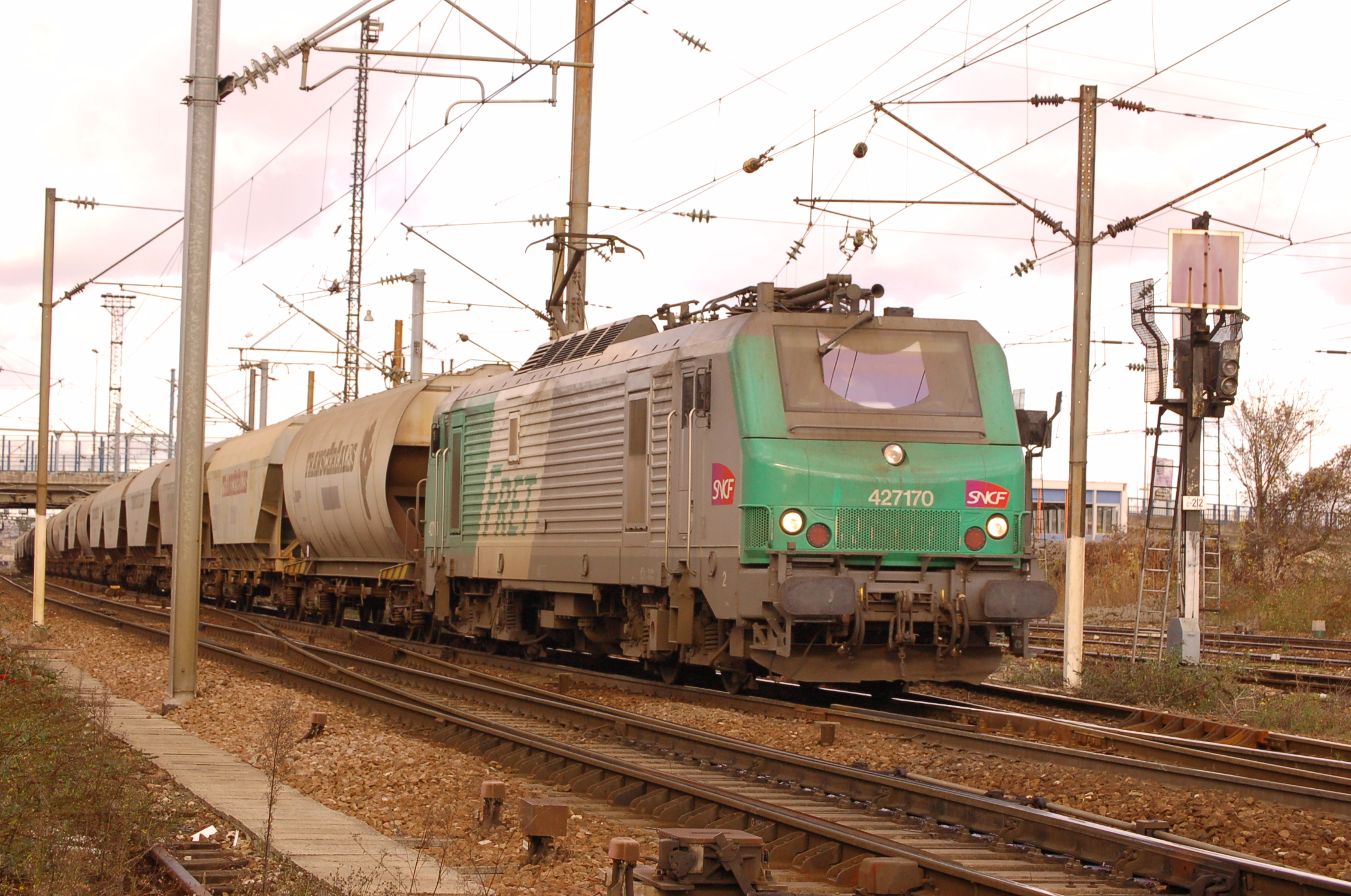 A Bobigny (Seine Saint Denis) un train de fret redescend sur Noisy le Sec en empruntant la ceinture classique, qui longe les voies de l'évite Noisy (au fond)